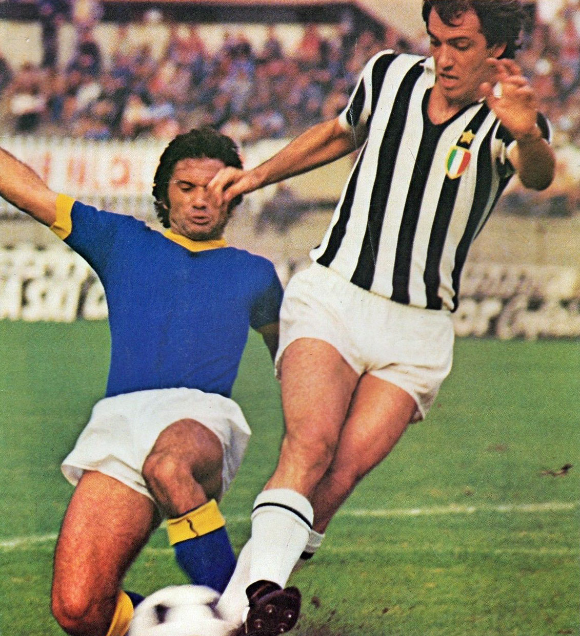 Torino, stadio Comunale, 5 ottobre 1975. Da sinistra: un contrasto tra il difensore veronese Sergio Maddè e l'attaccante juventino Roberto Bettega, nel corso della sfida tra Juventus e Verona (2-1) valevole per la 1ª giornata del campionato italiano di Serie A 1975-76.